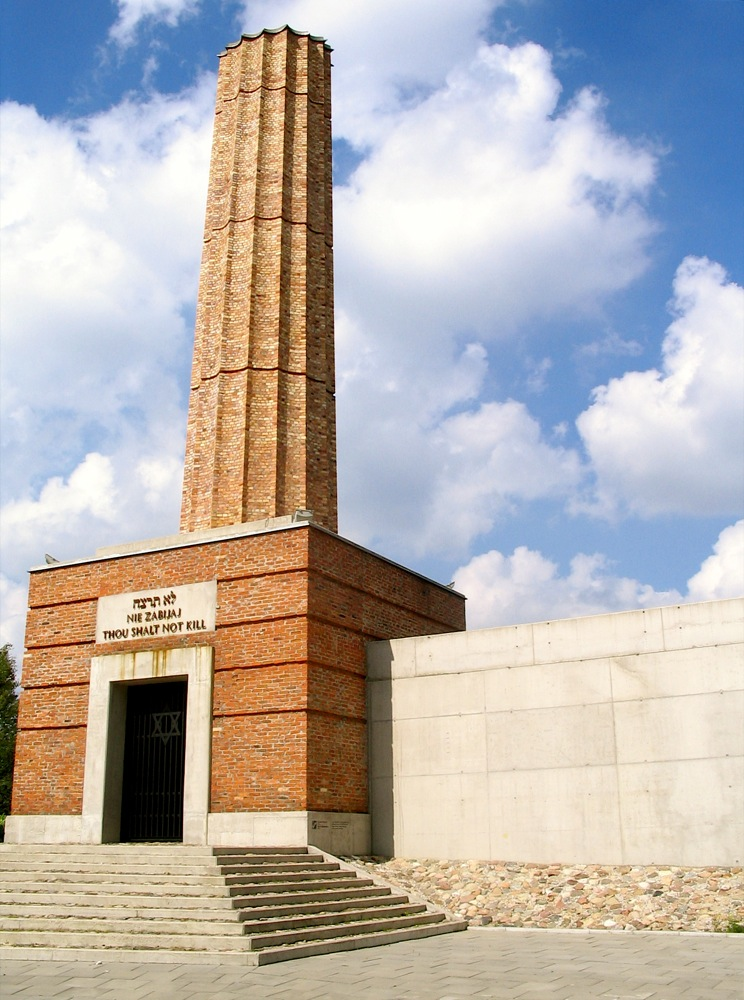 Stacja Radegast w Łodzi